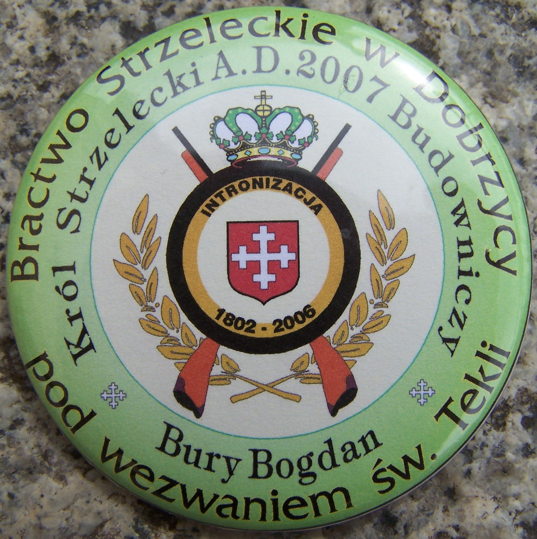 Polska, woj. wielkopolskie, powiat pleszewski, gmina Dobrzyca, Dobrzyca, okolicznościowa plakietka Bractwa Strzeleckiego (fotka wykonana za zgodą Króla Strzeleckiego 2007)